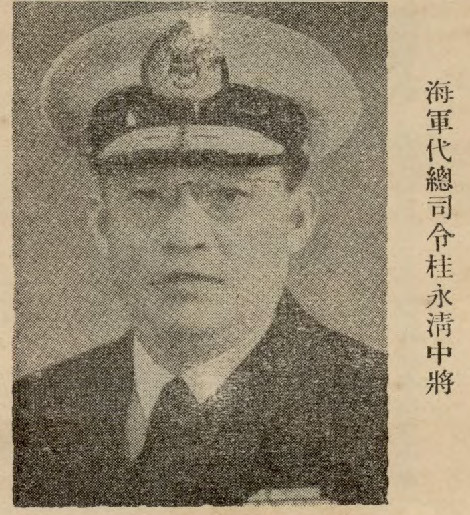 中文（中国大陆）: 中國新海軍插圖